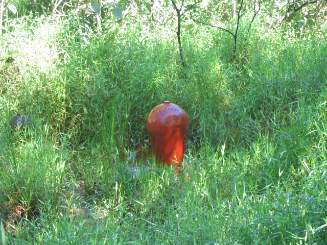 Bélier hydraulique employé à Bona Espero au Brésil